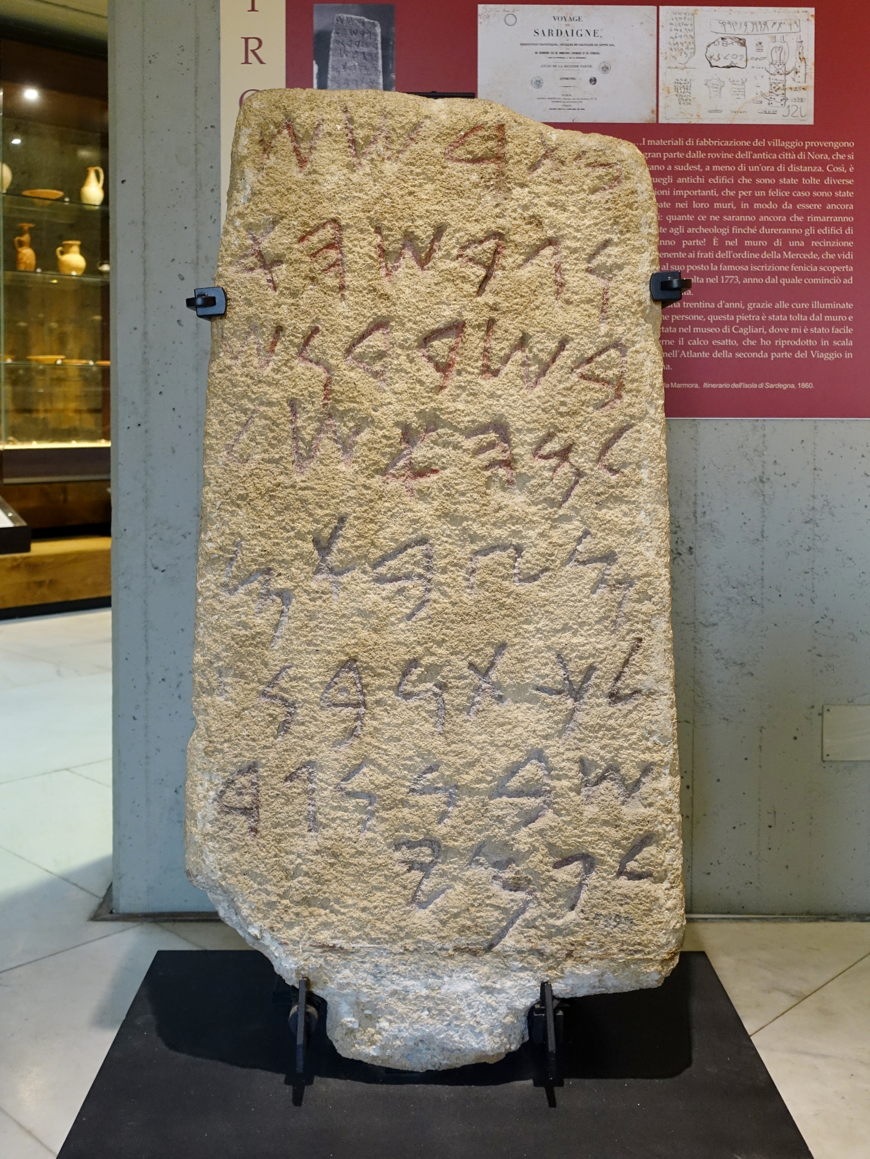 Stele von Nora, Gemeinde Pula, Archäologisches Nationalmuseum Cagliari, Sardinien, Italien